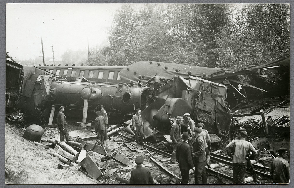 Järnvägsolyckan i Lenninge 22 juni 1928